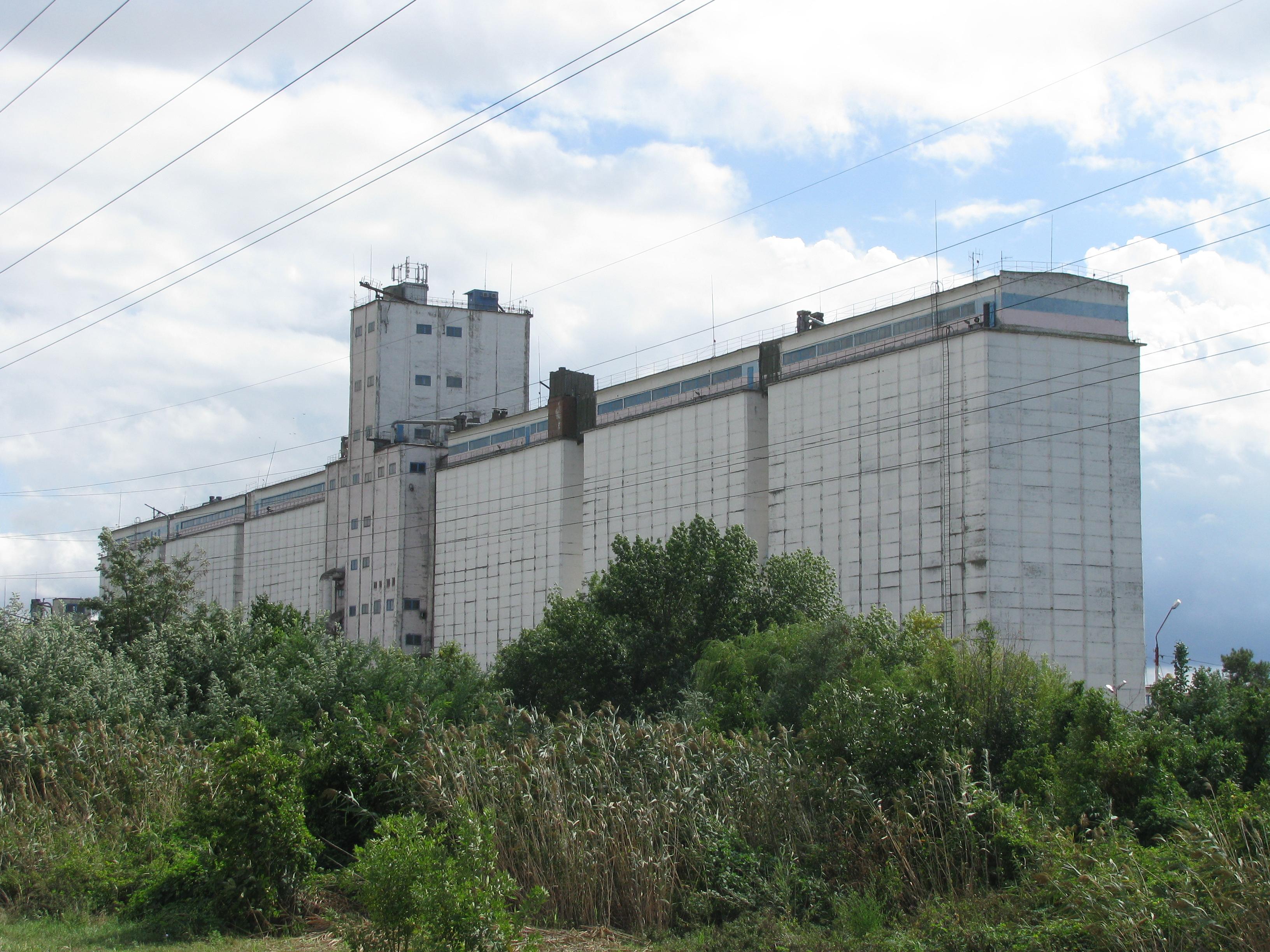 Элеватор в Тимашёвске.